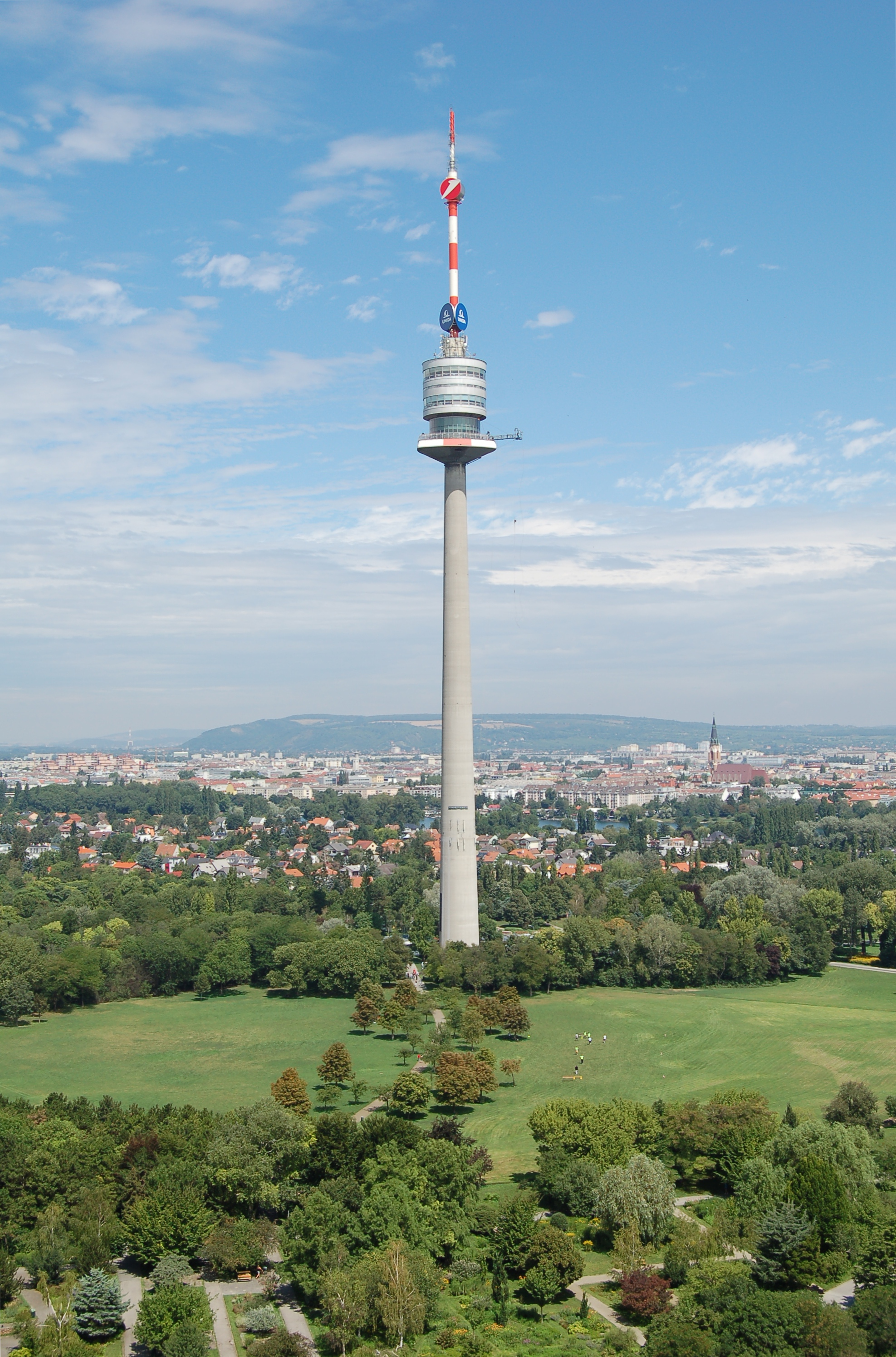 Donauturm in Wien